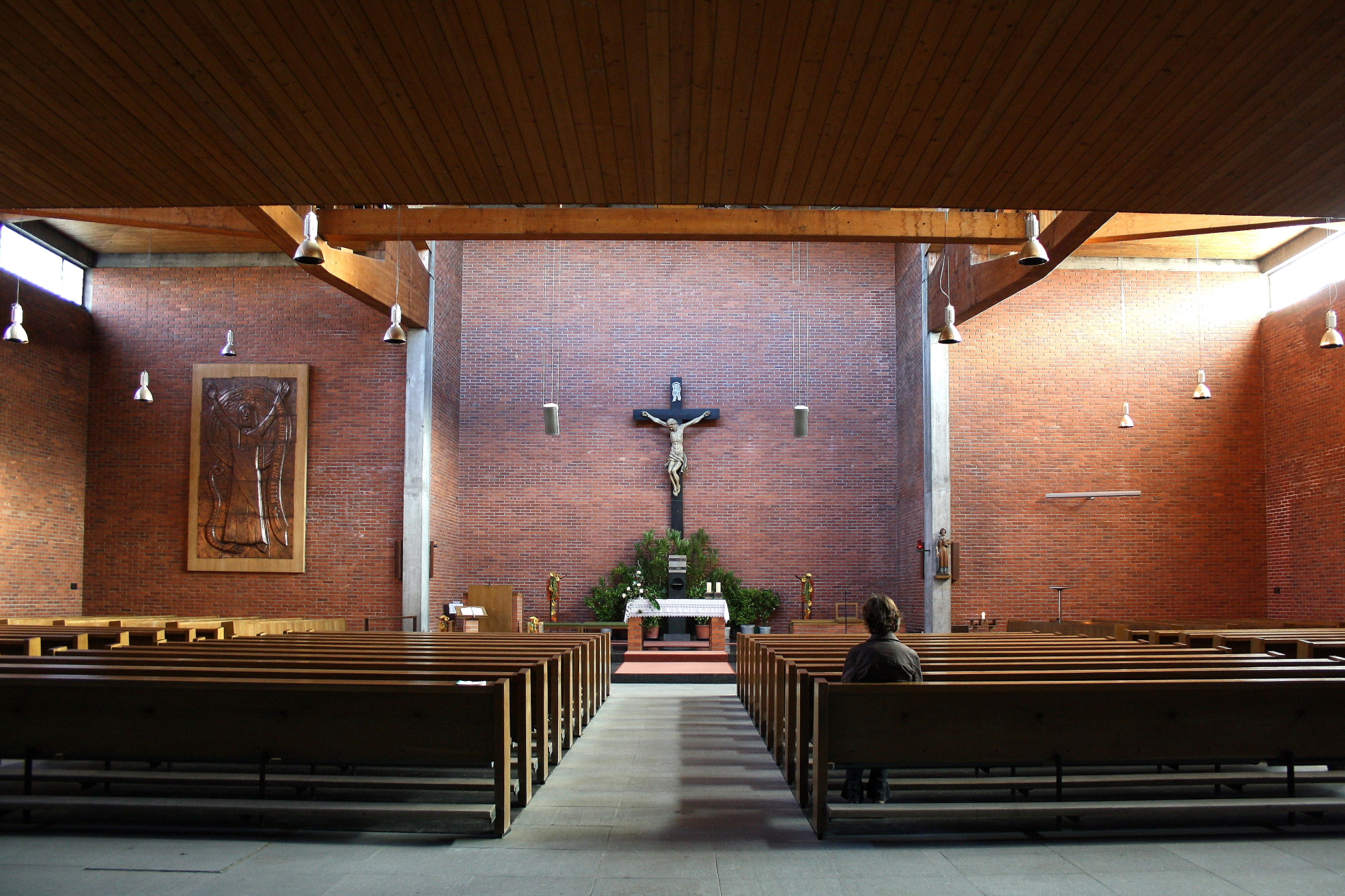 Innernansicht der röm.-kath. Pfarrkirche in Timelkam. Kruzifix von Giovanni Giuliani (um 1730).